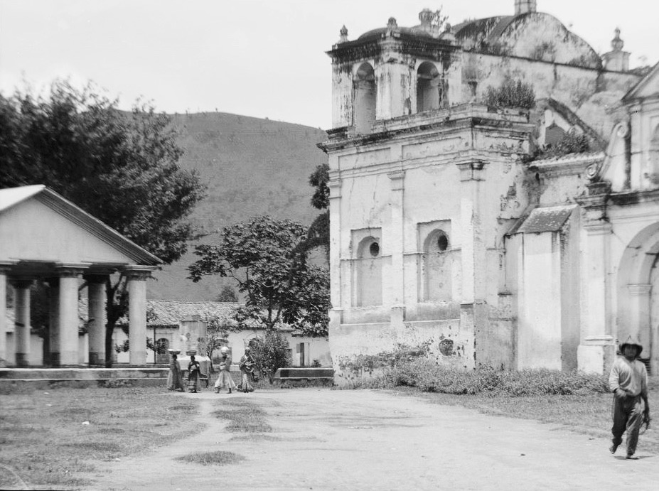 Parroquia de San Sebastian y Templo de Minerva en Antigua Guatemala en 1916